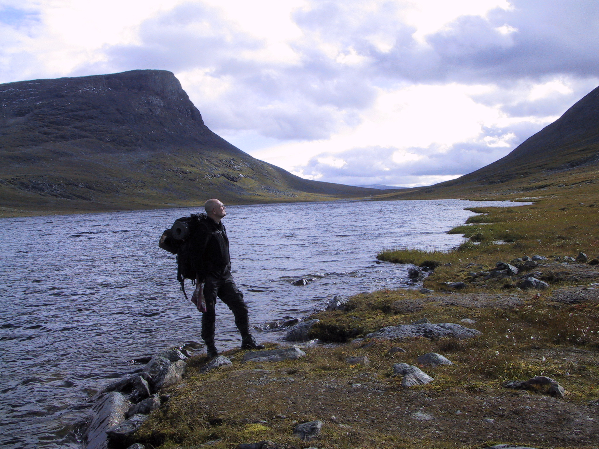 I Stormstyrka , mödosamt, att se och njuta av detta under av Natur!